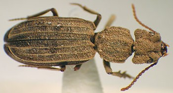 Solenogenys funkei paratype, Brazil: Amazonas, Rio Taruma Mirim-Igapó.